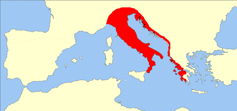 Distribución de Rutilus Rubilio (Rutilo sureuropeo).